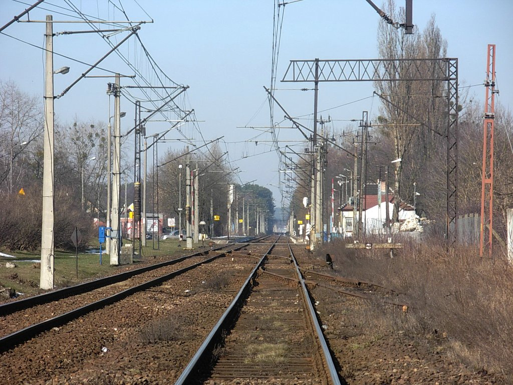 Kolej w Bydgoszczy - kierunek Piła